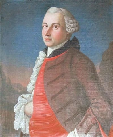 Trelasthandler, reder og bankier. Niels Carlsen (1734-1809) er fremdeles et lysende navn i Drøbak. Han var toneangivende i stedets oppblomstring i seilskutetiden som reder, eksportør, importør, finans- og handelsmann.